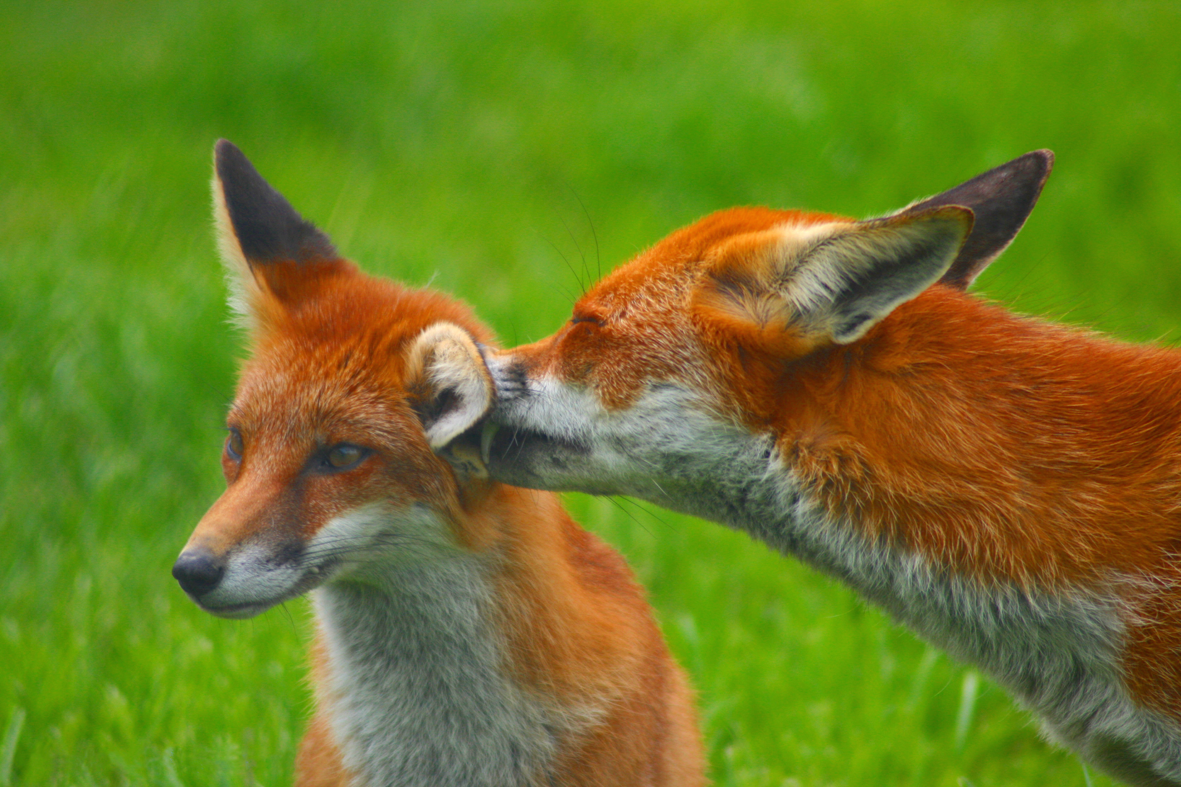 Couple de renards roux, l'un léchant l'oreille du second